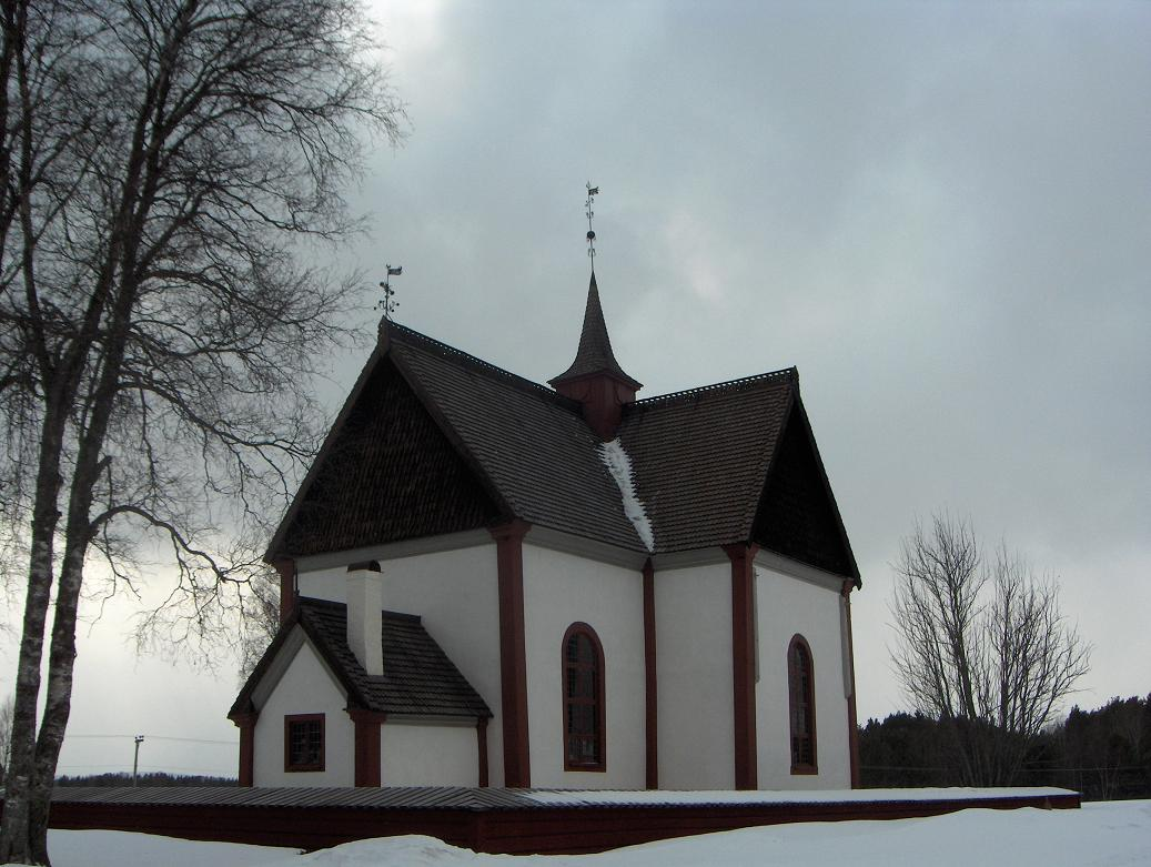 Älvros gamla kyrka, extriör